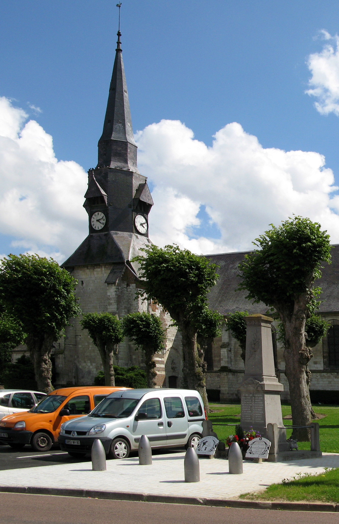 Revelles (Somme, France) - L'église, le monument-aux-morts et la place. .